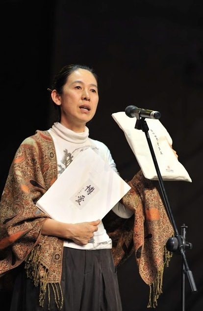 寇延丁近身照